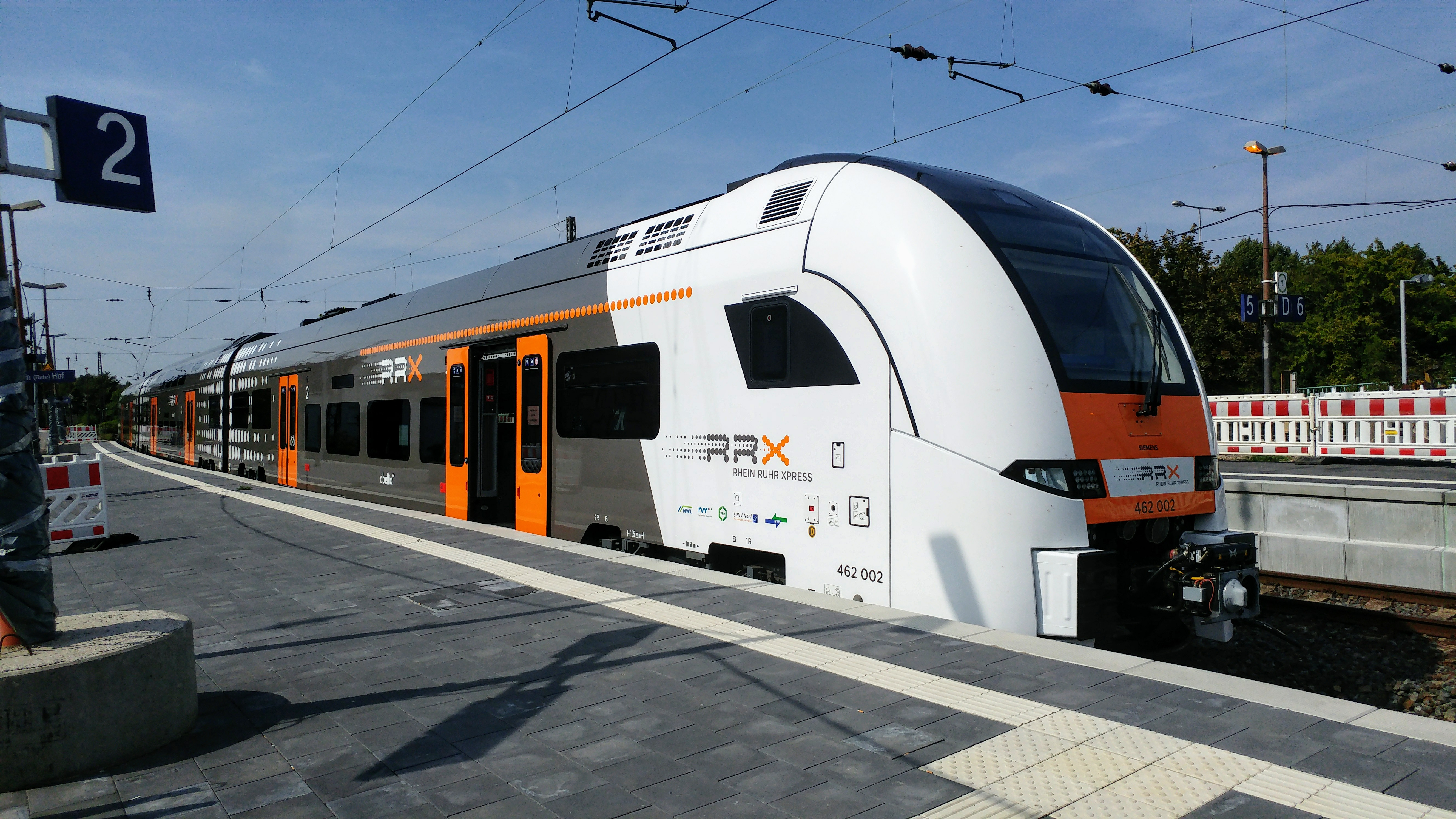 Ein RRX am Mülheim (Ruhr) Hauptbahnhof.